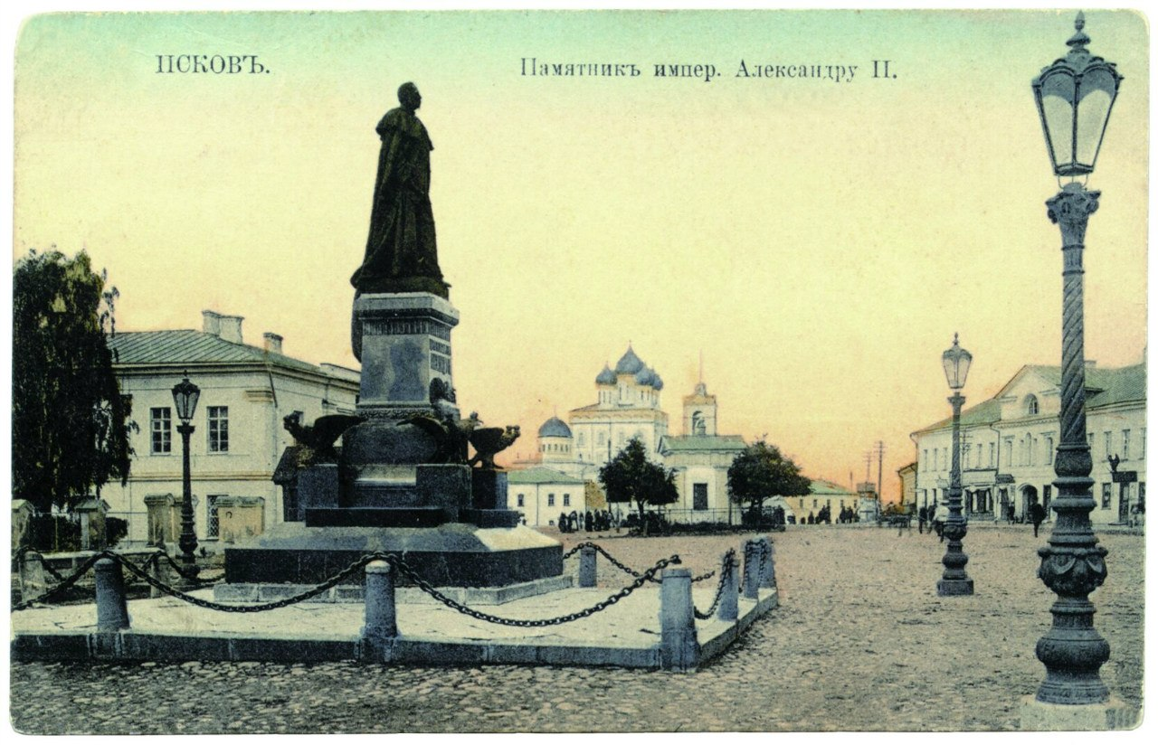 Дореволюционная открытка, на которой изображён памятник Императору Александру II Освободителю